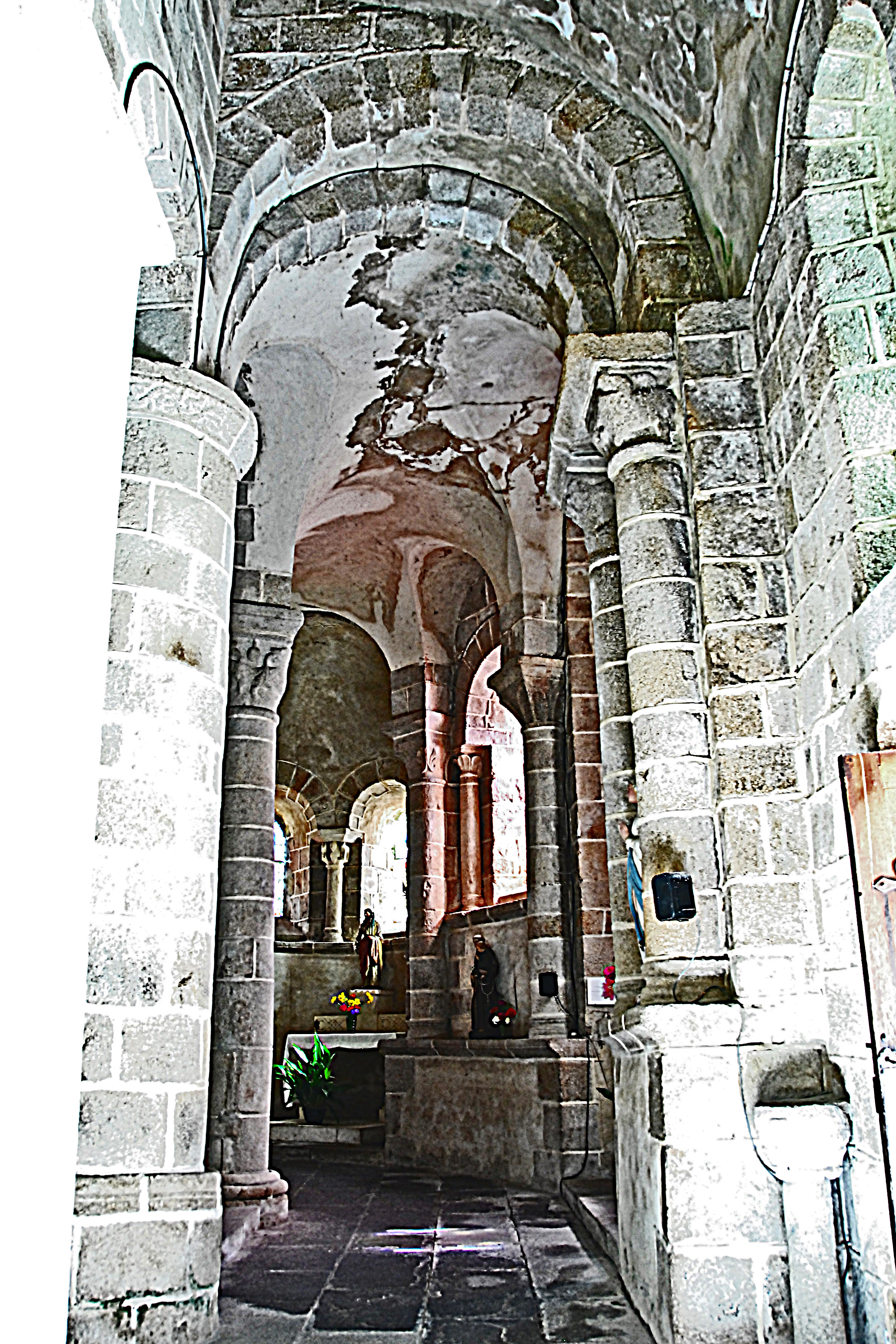 N.-D. de Châtel-Montagne, südl. Chorumgang